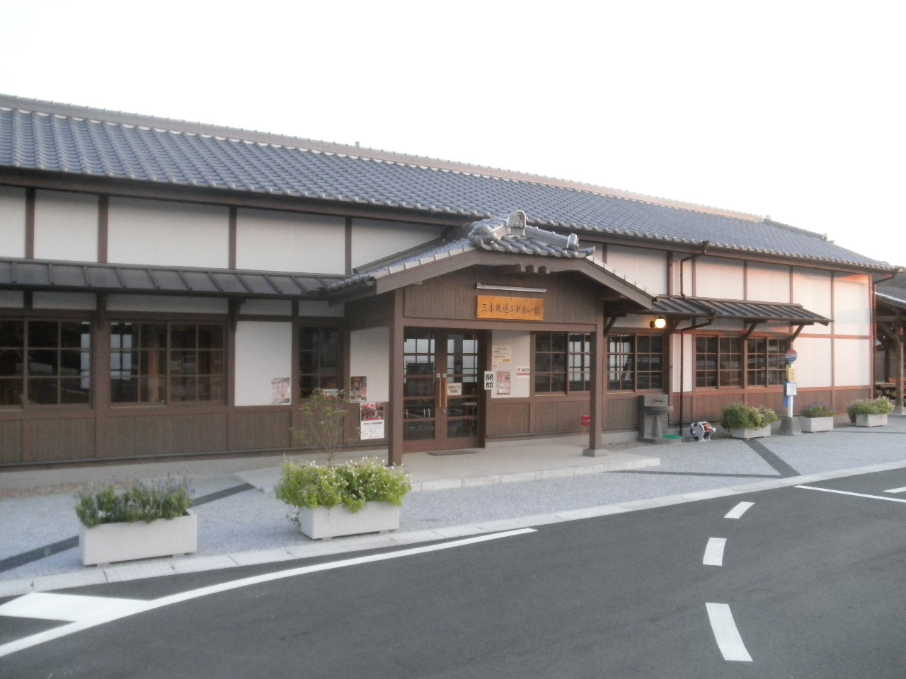 三木鉄道記念公園